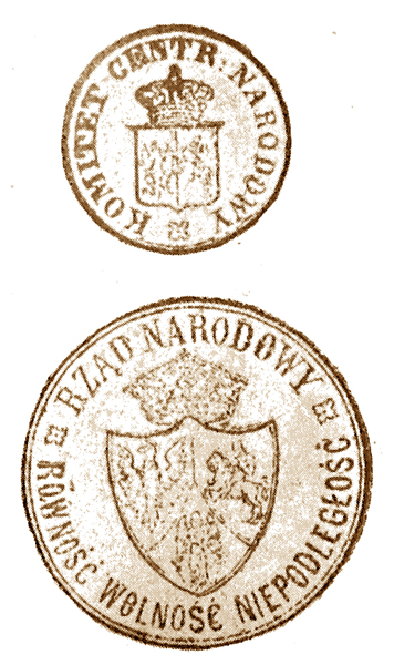 Powstanie Styczniowe - Pieczęci Komitetu Centralnego Narodowego i Rządu Narodowego